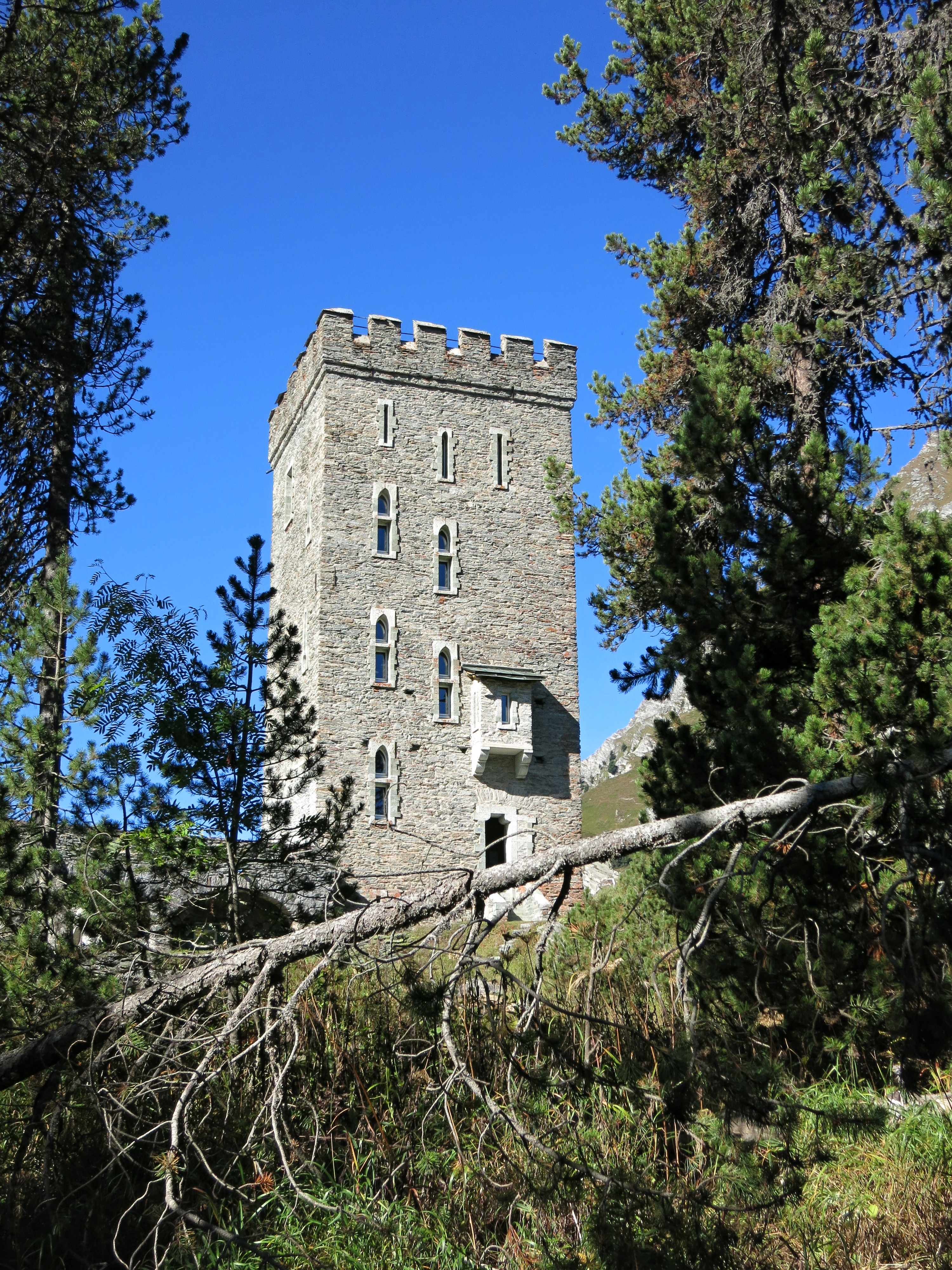 Torre Belevedere